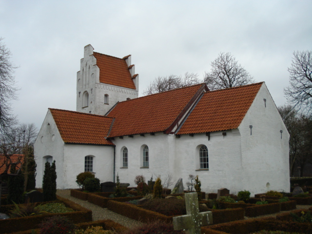 Blegind Church/Blegind Kirke, Jutland, Denmark